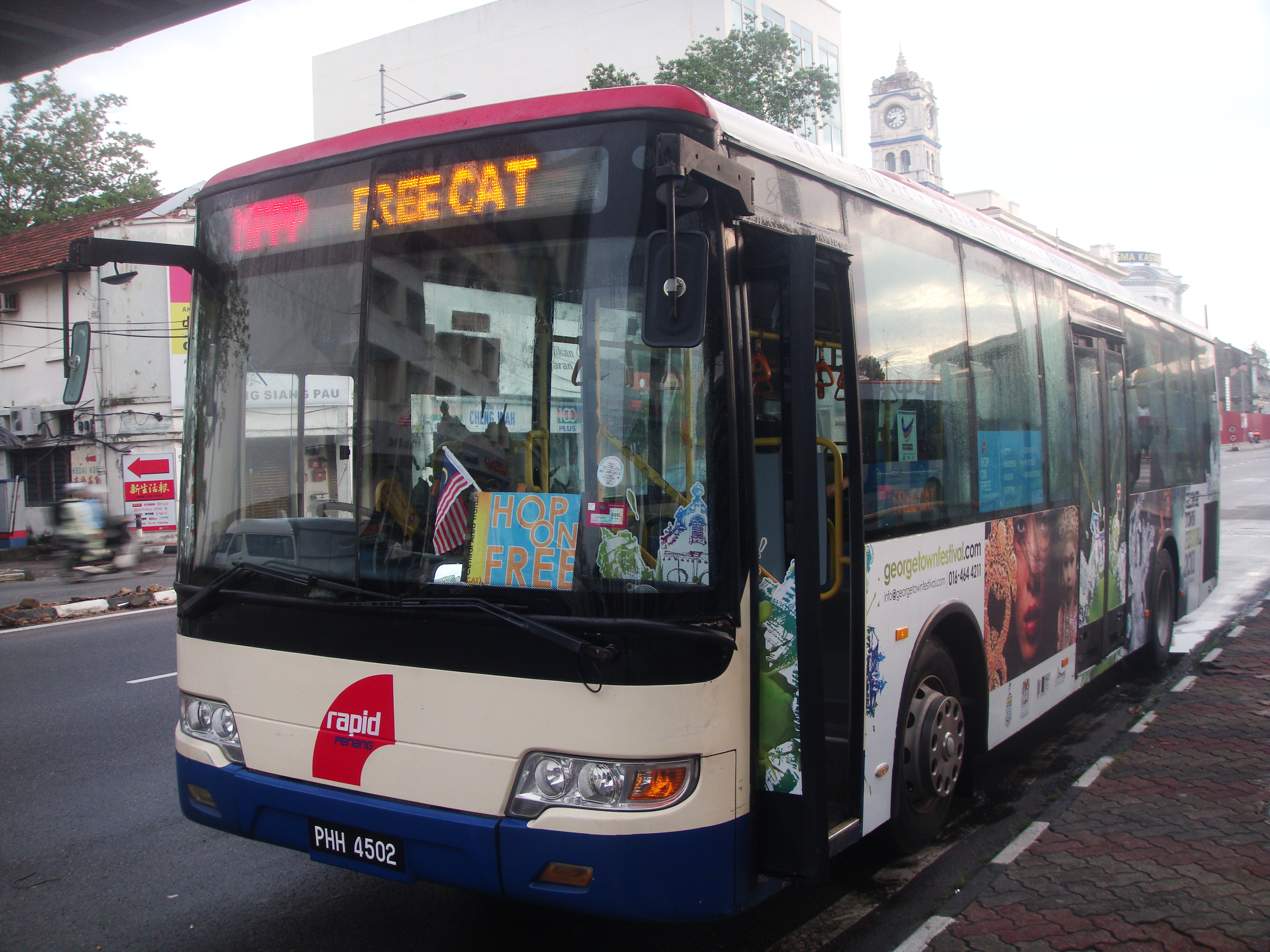 A Higer XLQ6118 bus operated by RapidPenang in Penang, Malaysia.